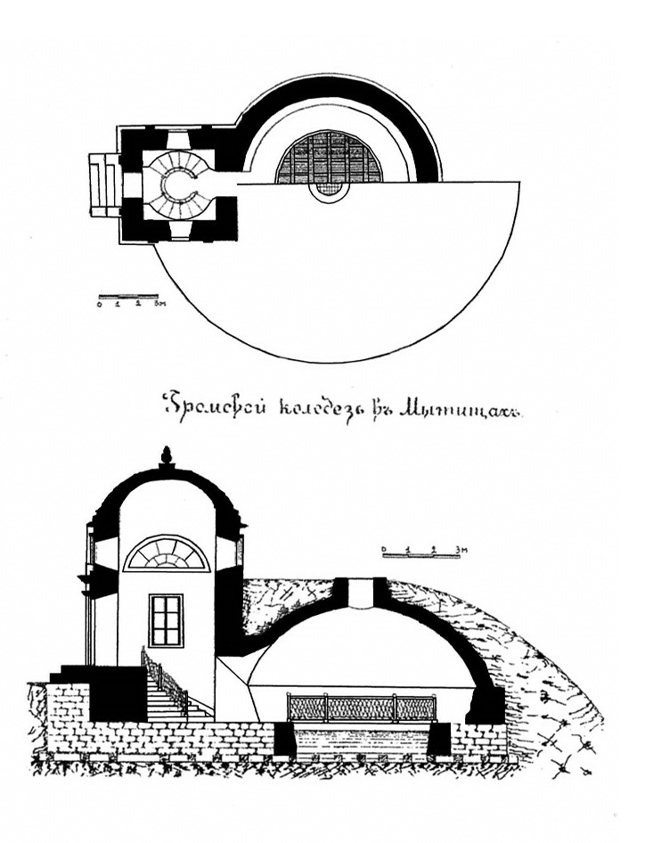 План и разрез Громового ключа